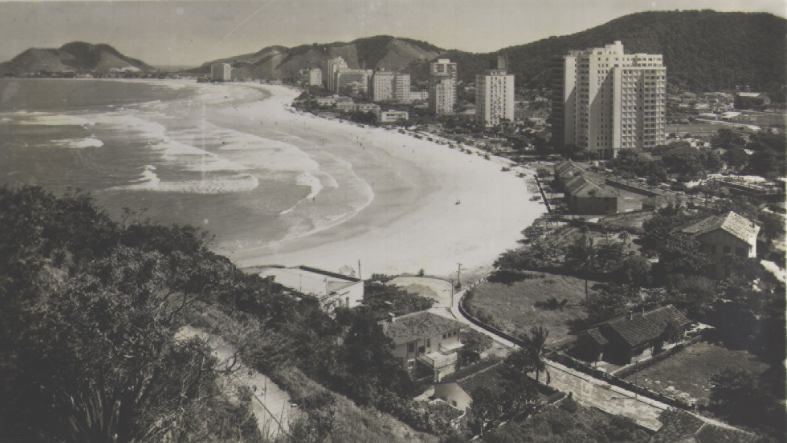 Obra que integra o acervo do Museu Paulista da USP. Coleção Werner Haberkorn